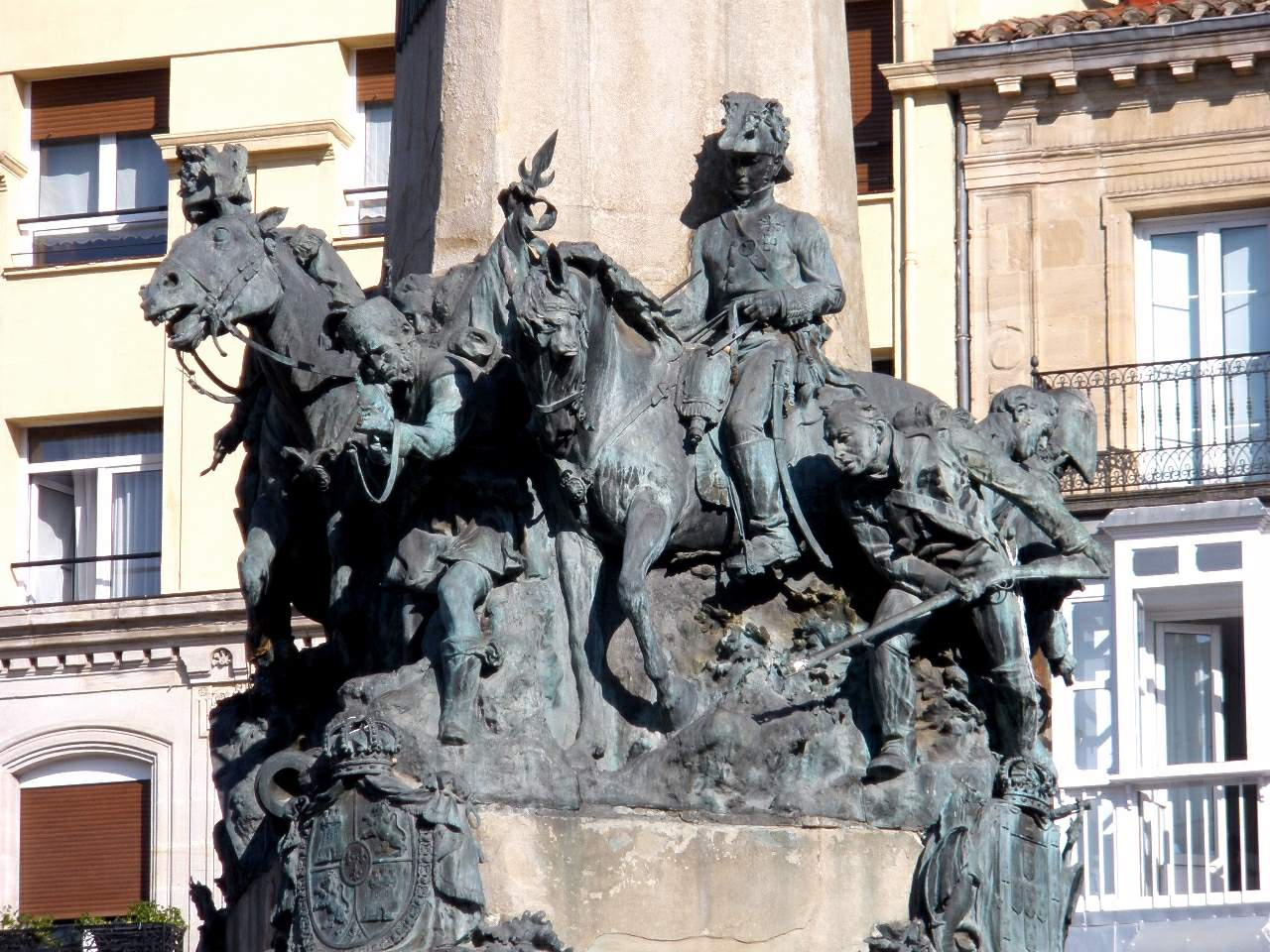 Monumento a la Batalla de Vitoria (1813), en la Plaza de la Virgen Blanca, Vitoria-Gasteiz